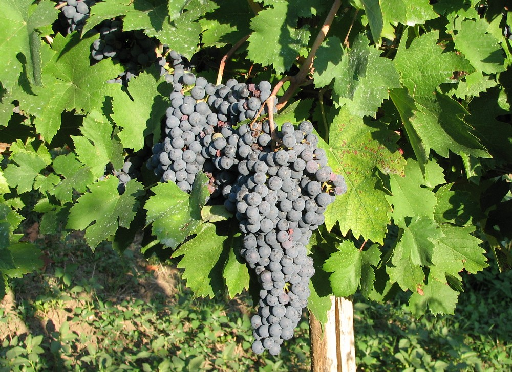 Grappoli di Croatina in Oltrepò Pavese.